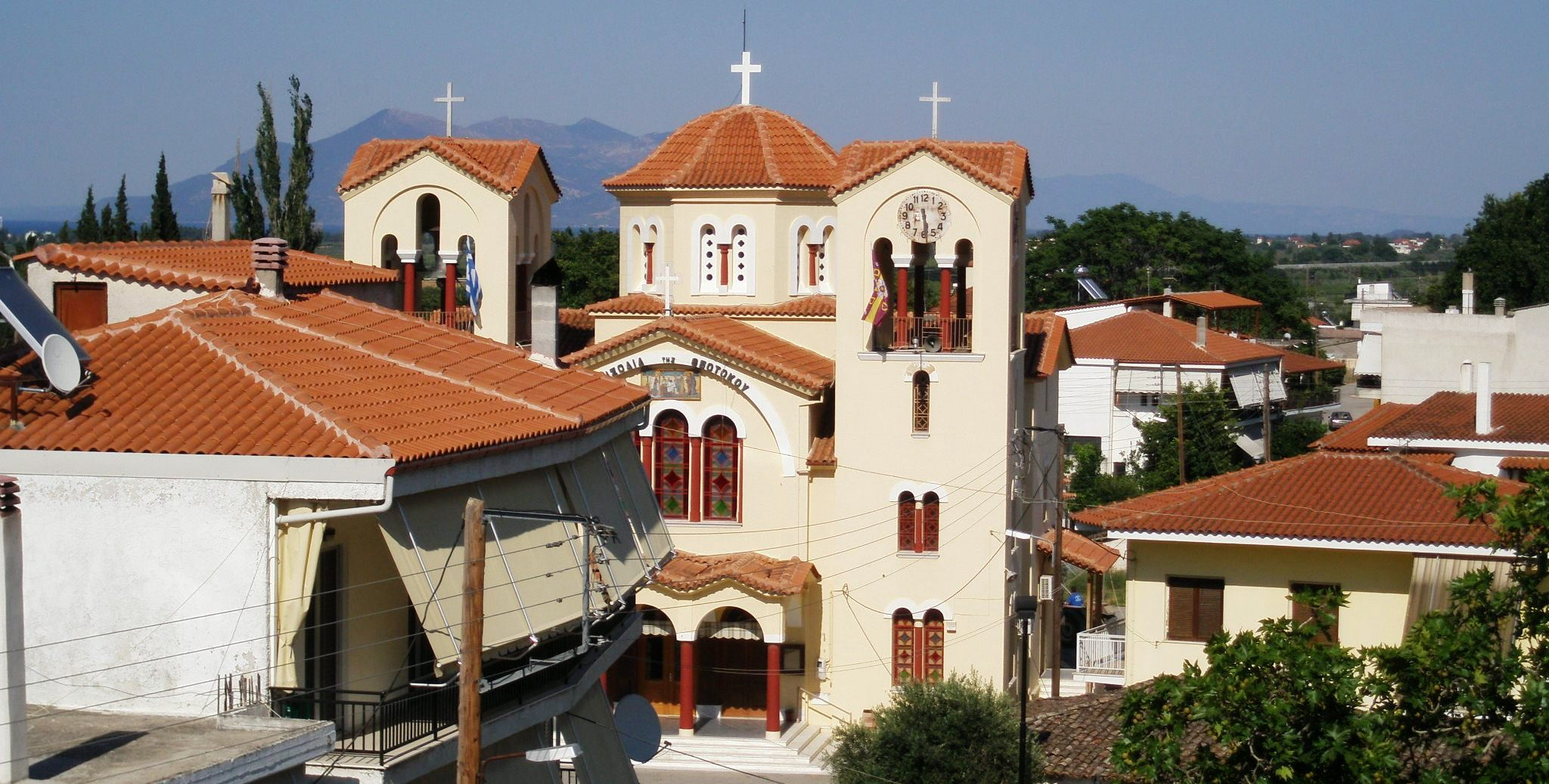 Ιερός Ναός Τα Εισόδια της Θεοτόκου